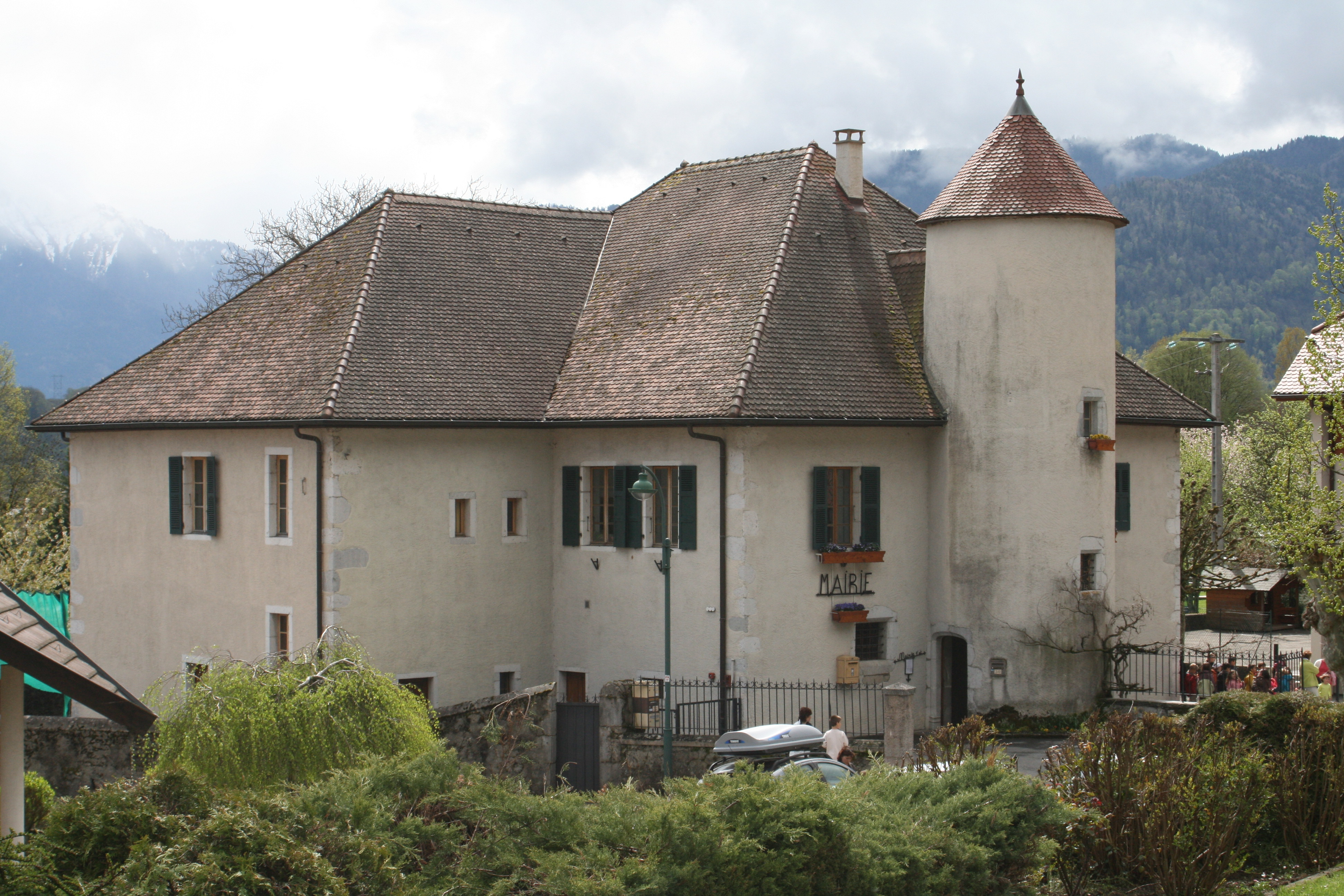 Mairie-école de Lathuile installées dans une ancienne maison-forte (ne pas confondre avec l'ancien château de Lathuile aujourd'hui en ruines).